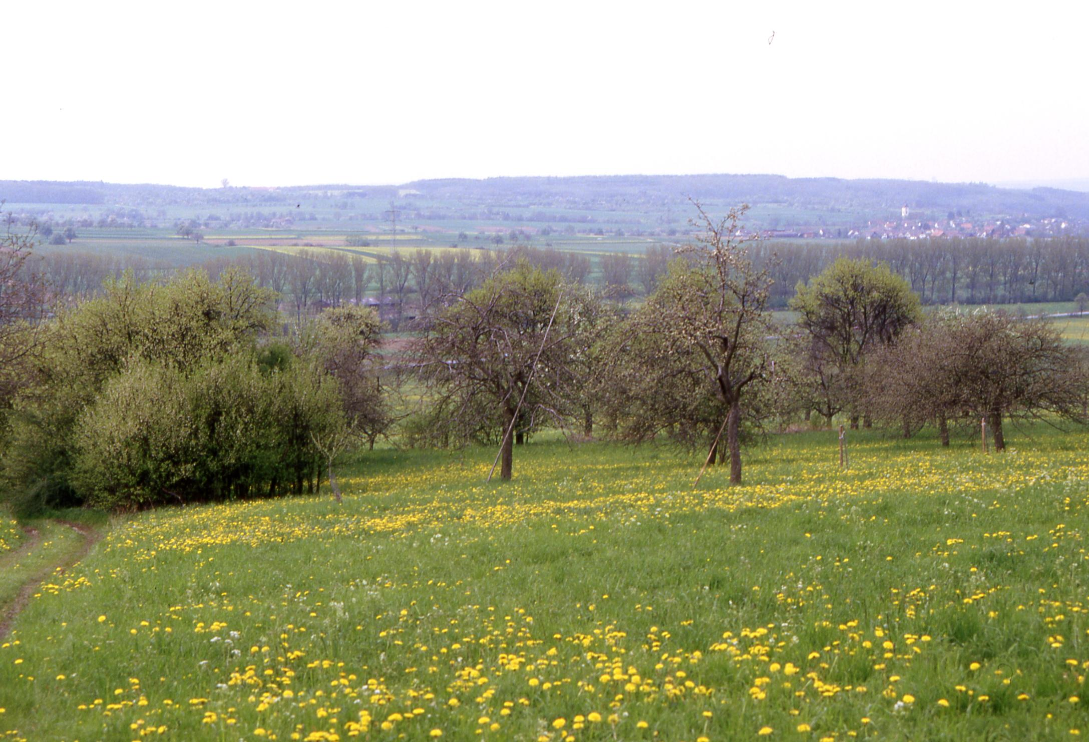 Streuobstwiesen am Ofterdinger Berg, mit Blick nach Dußlingen, zum Rammert und zum Eckhof.